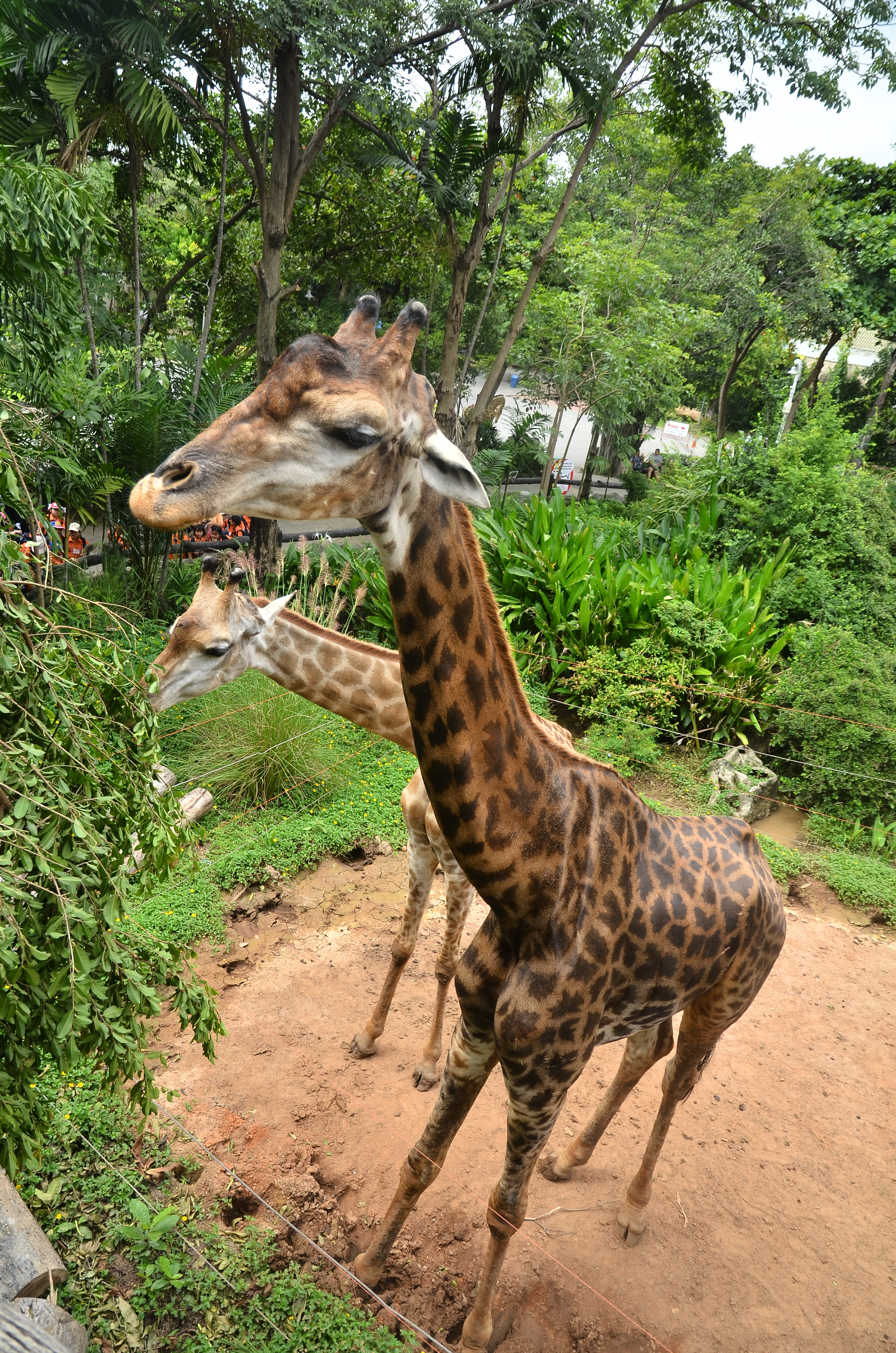 giraffe eating leaf in dusit zoo